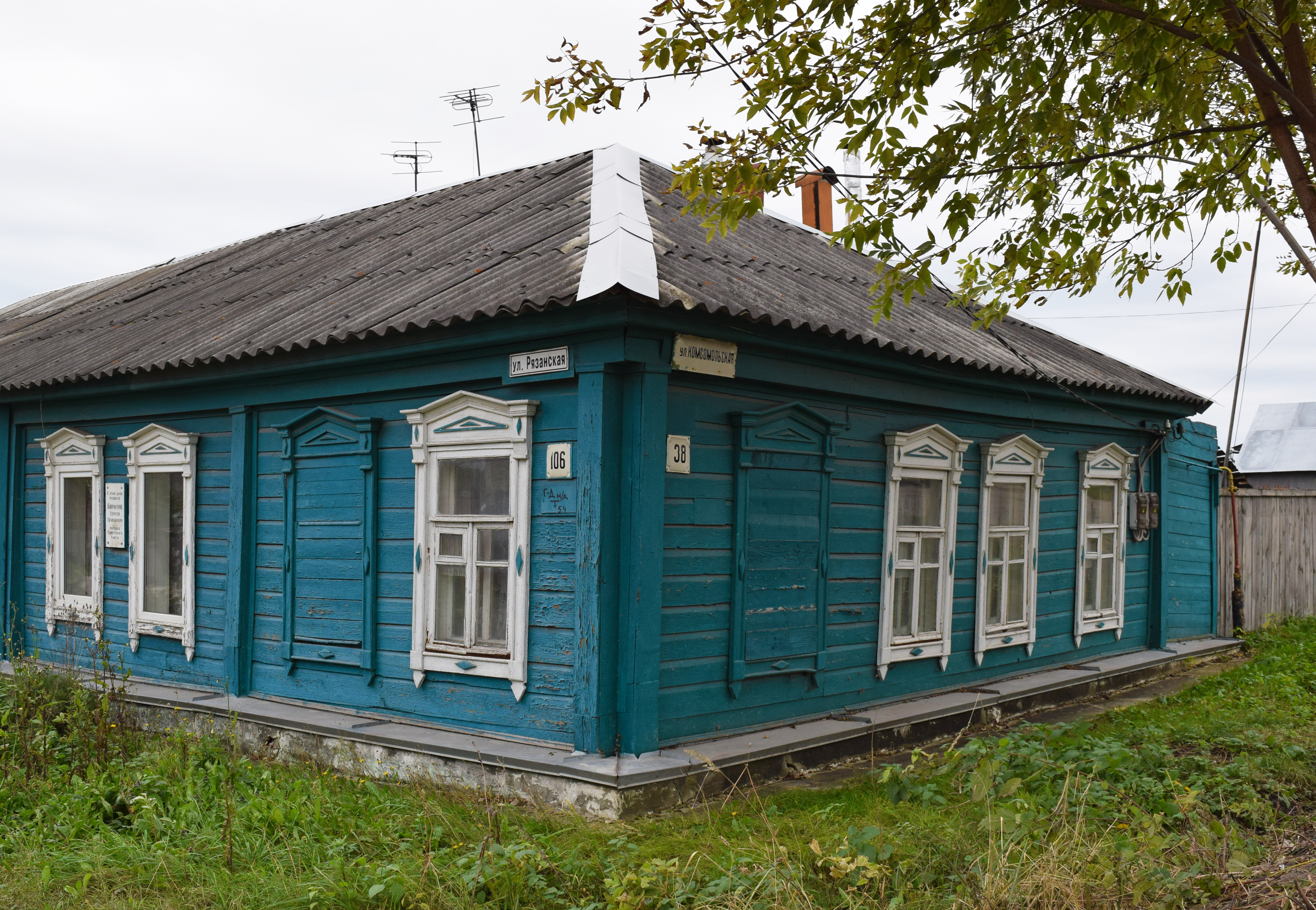 Дом, где родился Маршал Советского Союза Сергей Бирюзов. Рязанская область, г.Скопин